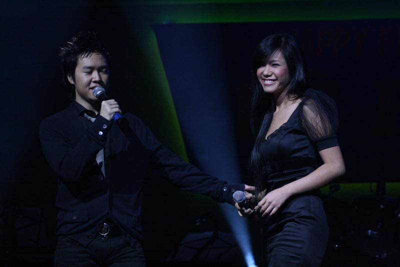 Chân dung ca sĩ Phương Vy